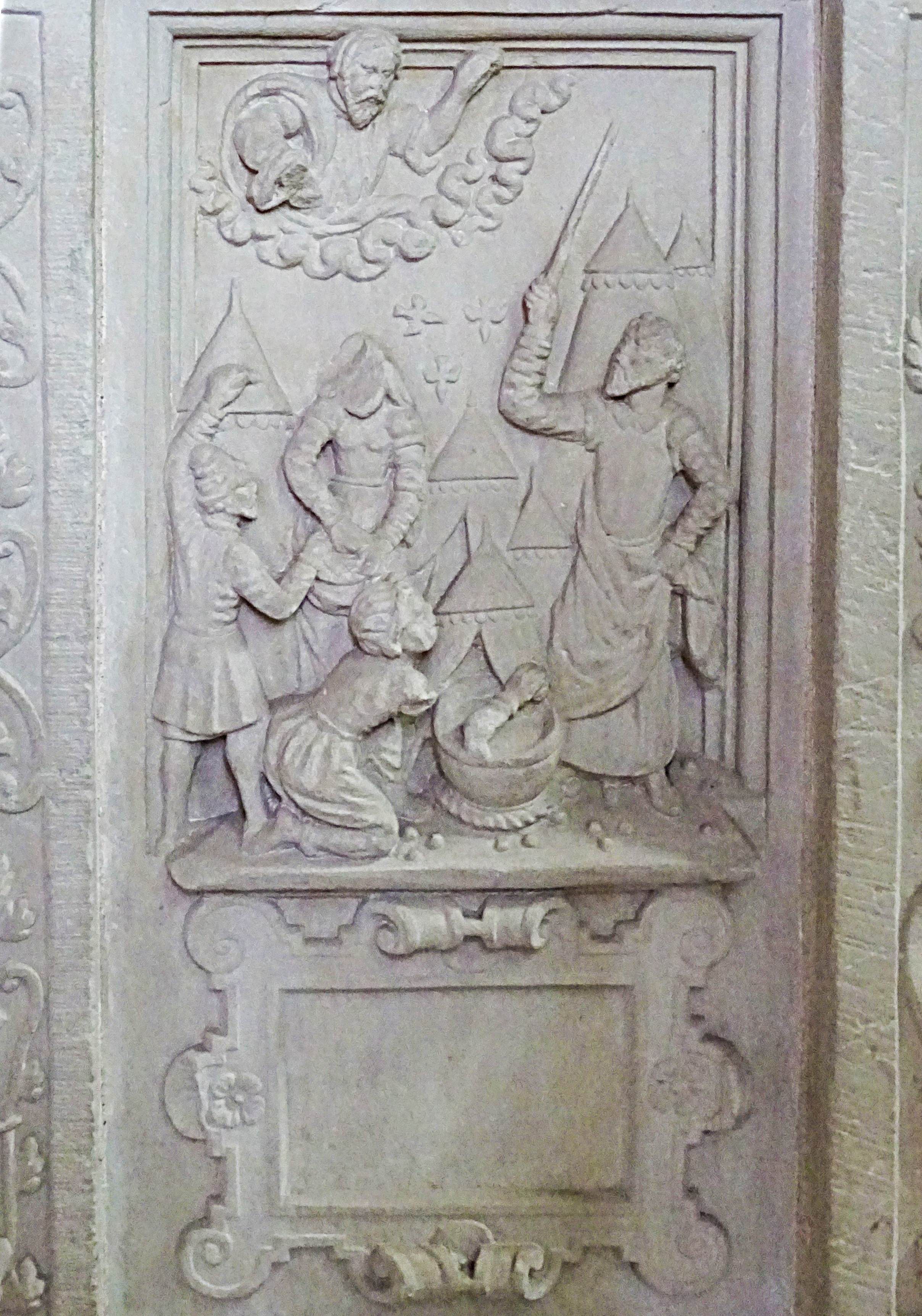 Steinbilderbibel in der St. Annenkirche (Eisleben), 16/29, Speisung der Israeliten mit Wachteln und Manna